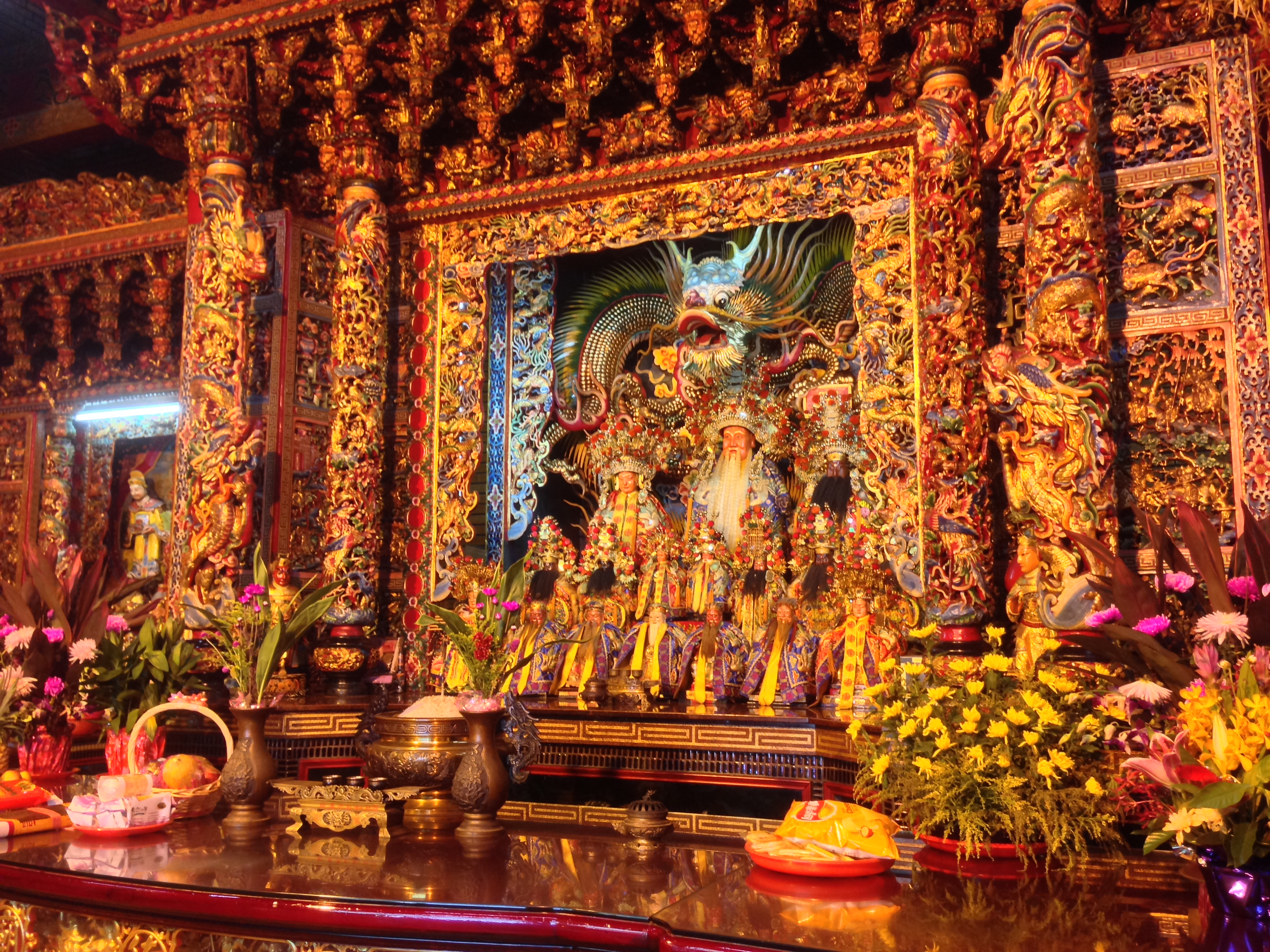 中文（台灣）: 四結福德廟神像